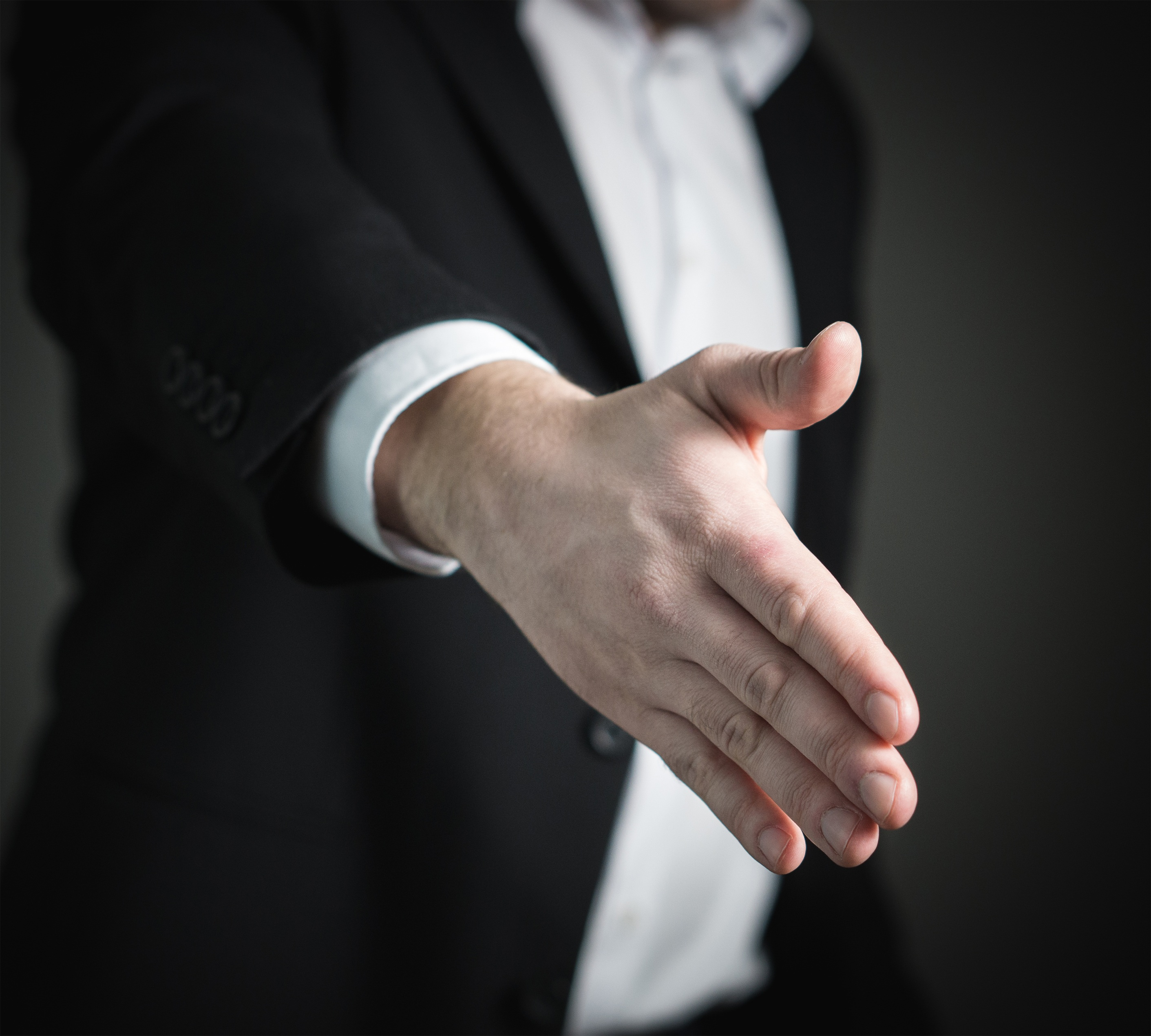 Anbieten der Hand für einen Handschlag